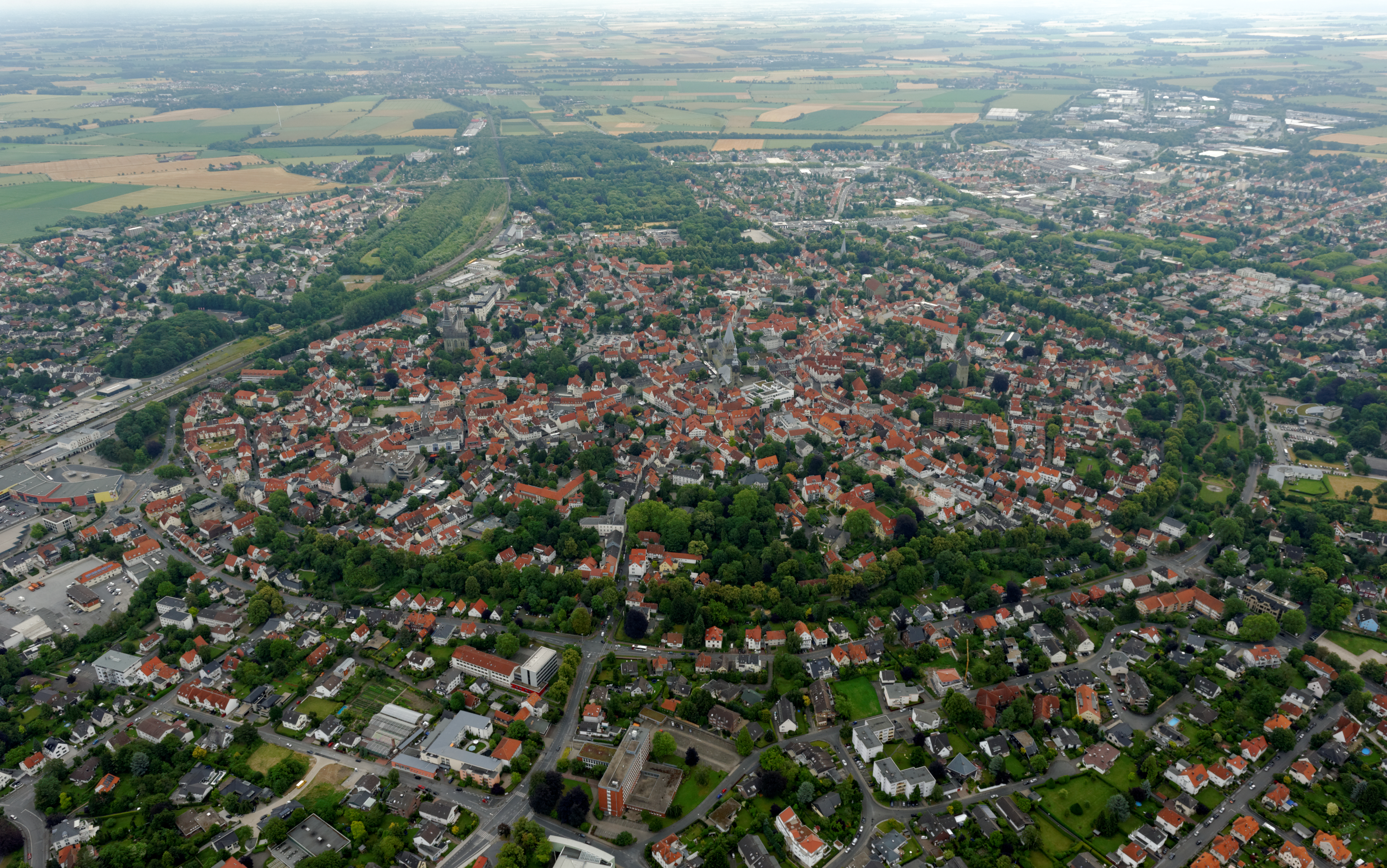 Fotoflug Sauerland Nord. Soest: Altstadt, vorne Nöttentor, Blick Richtung Osten The making of this document was supported by the Community-Budget of Wikimedia Germany.